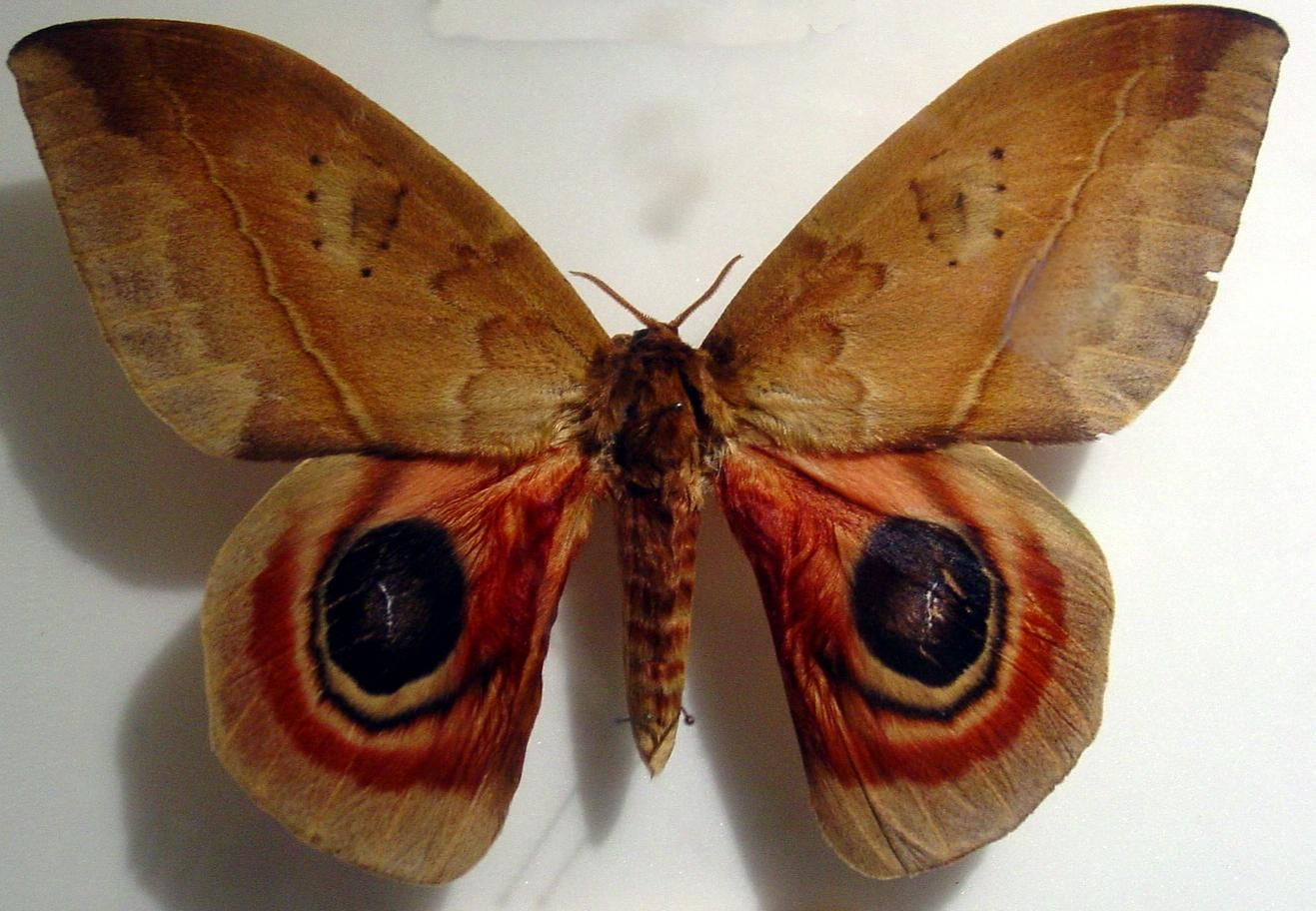 self made.